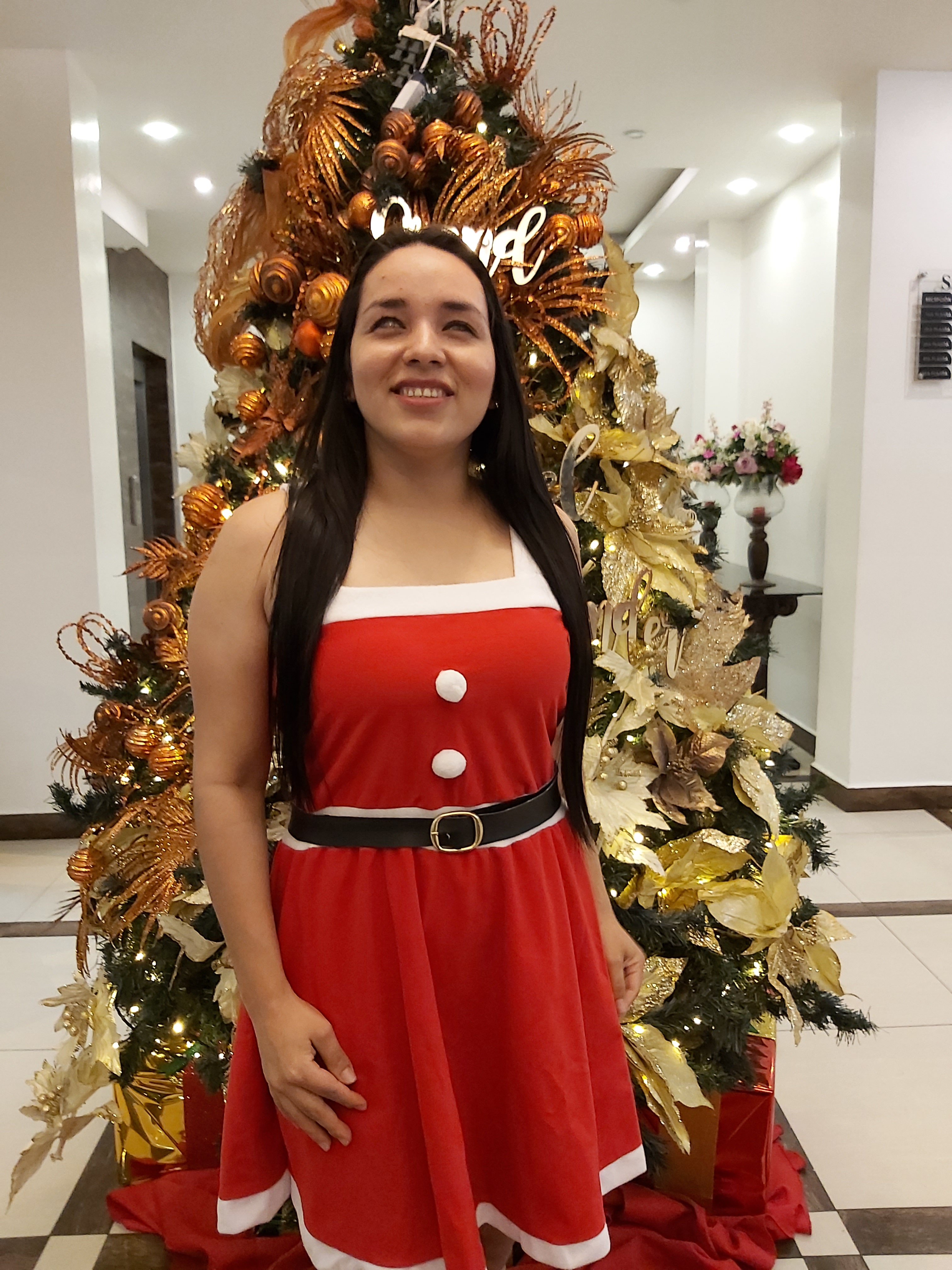 Diana Coloma en 2019.